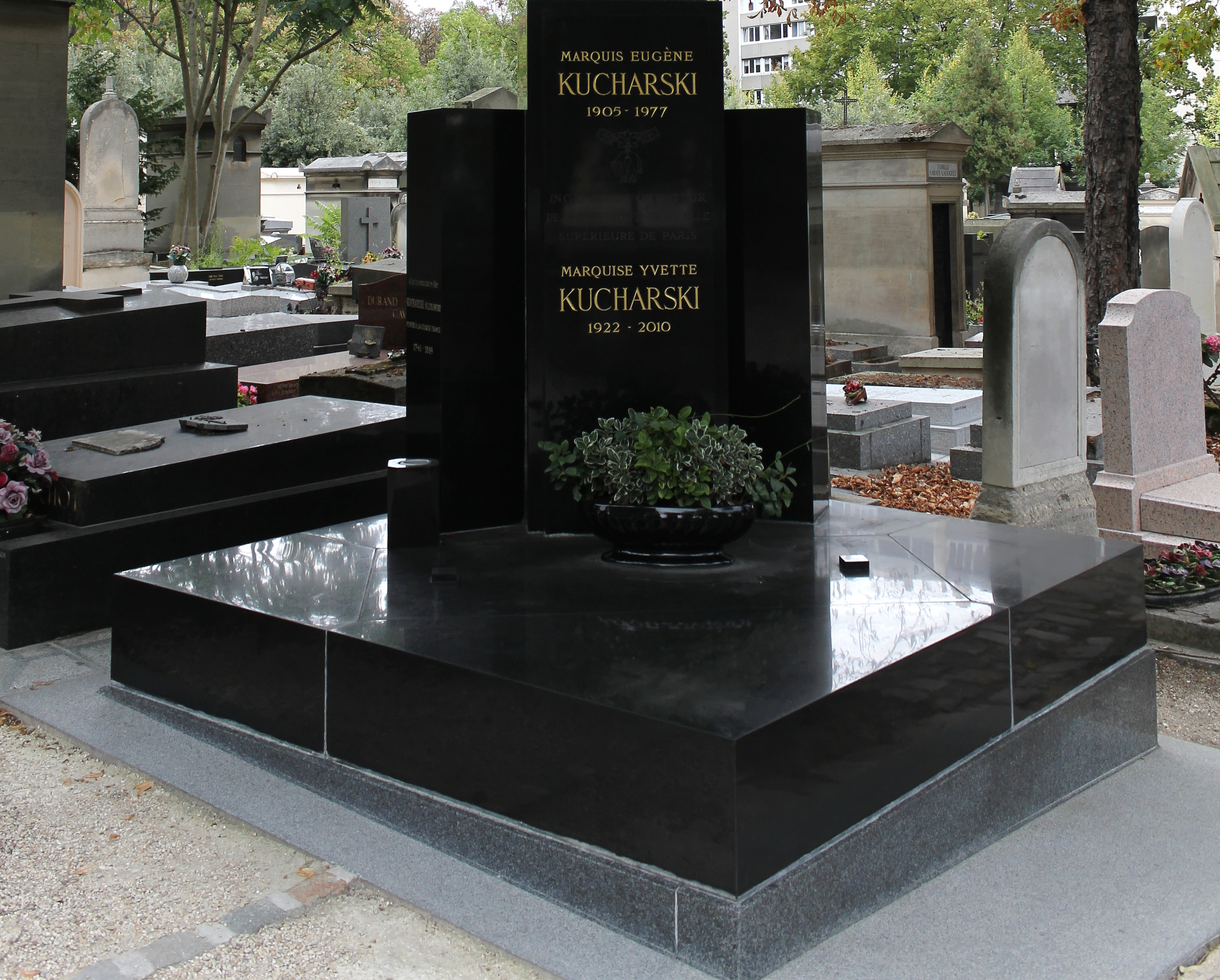 Tombe surmontée d'une statue en bronze